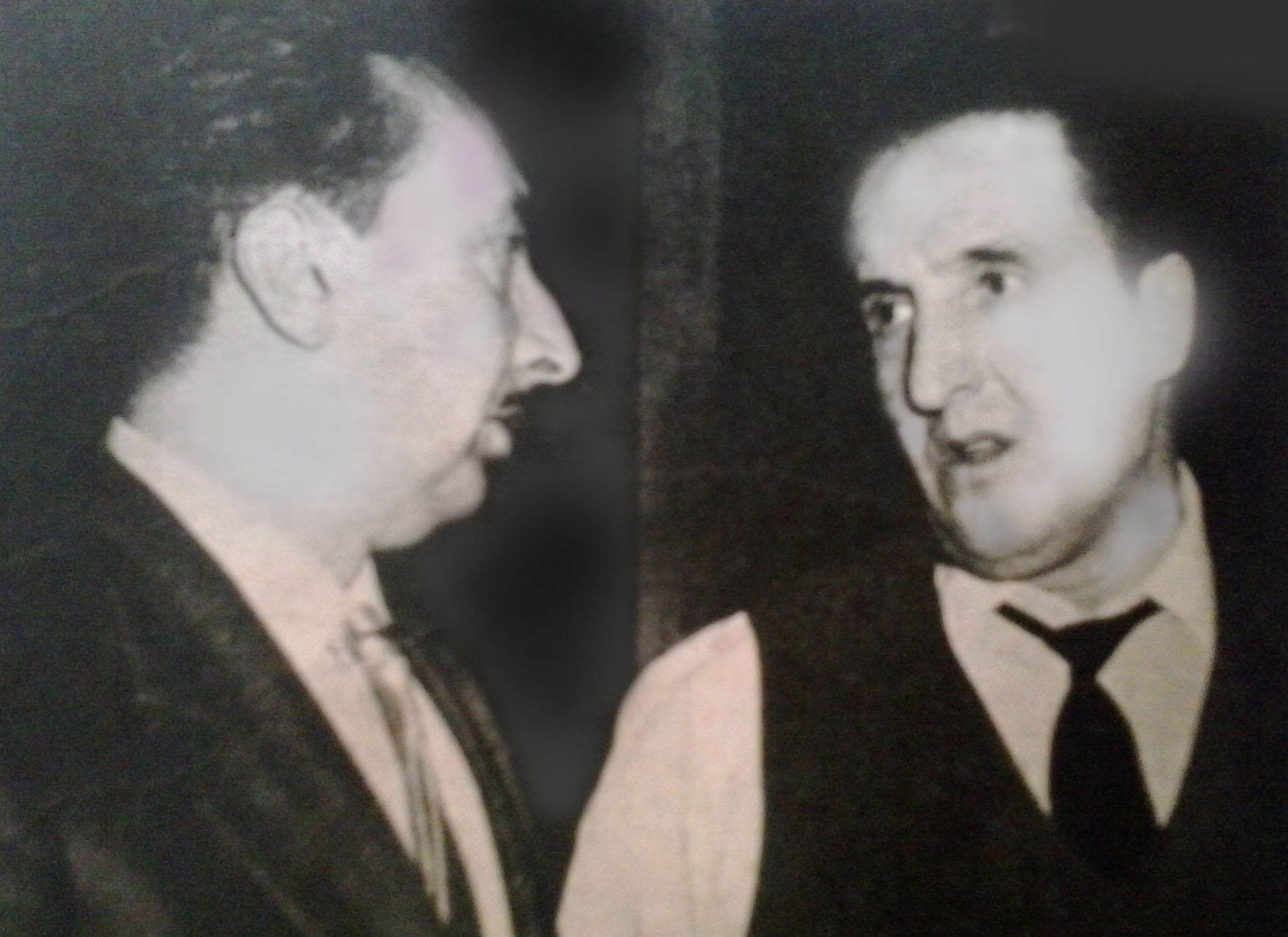 Vitaliano Brancati e Luigi Zampa ("Anni facili" 1953)